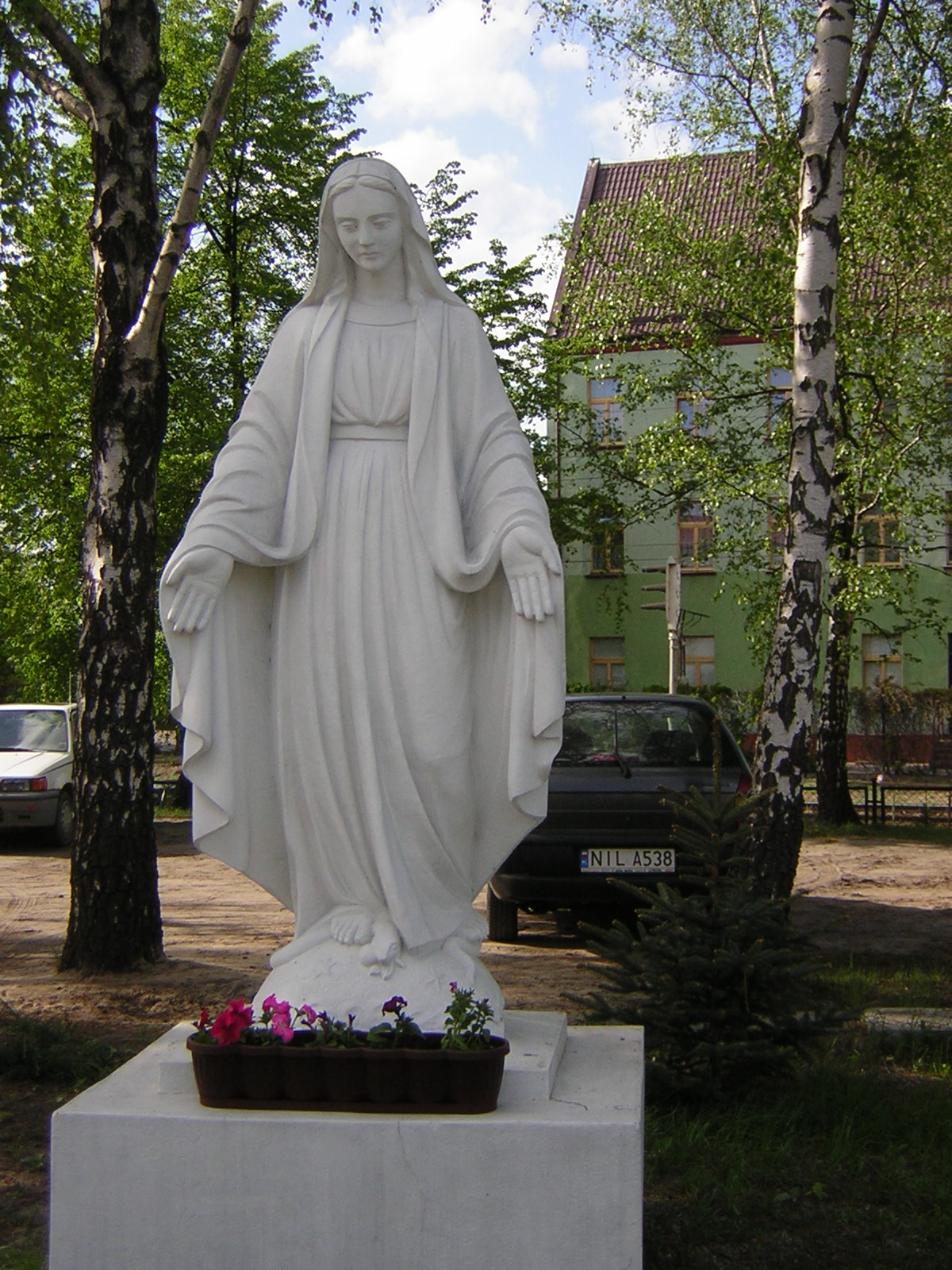 Pomnik Matki Boskiej w Iławie przy kościele NPNMP.